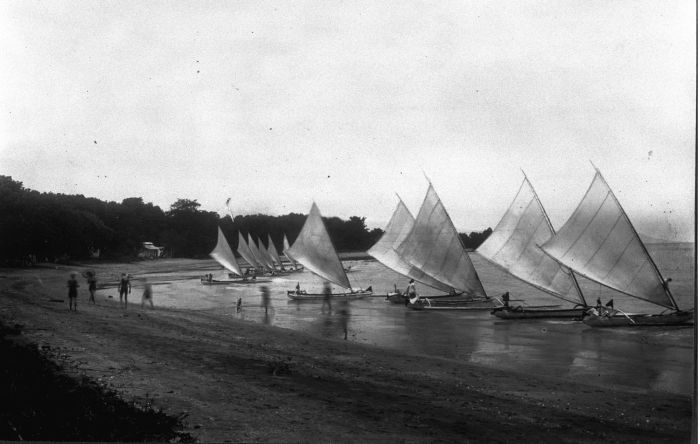 Foto. Inlandse plezierjachten voor het strand van Pasirpoetih aan Straat Madoera op Oost-Java.